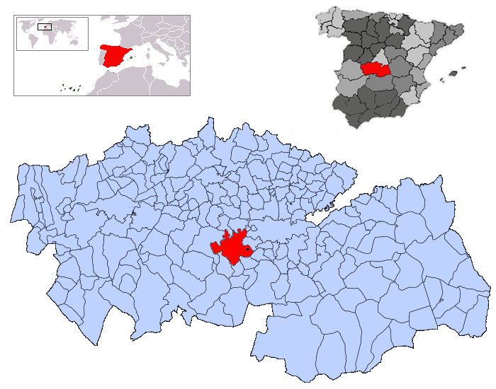 Polán en la provincia de Toledo